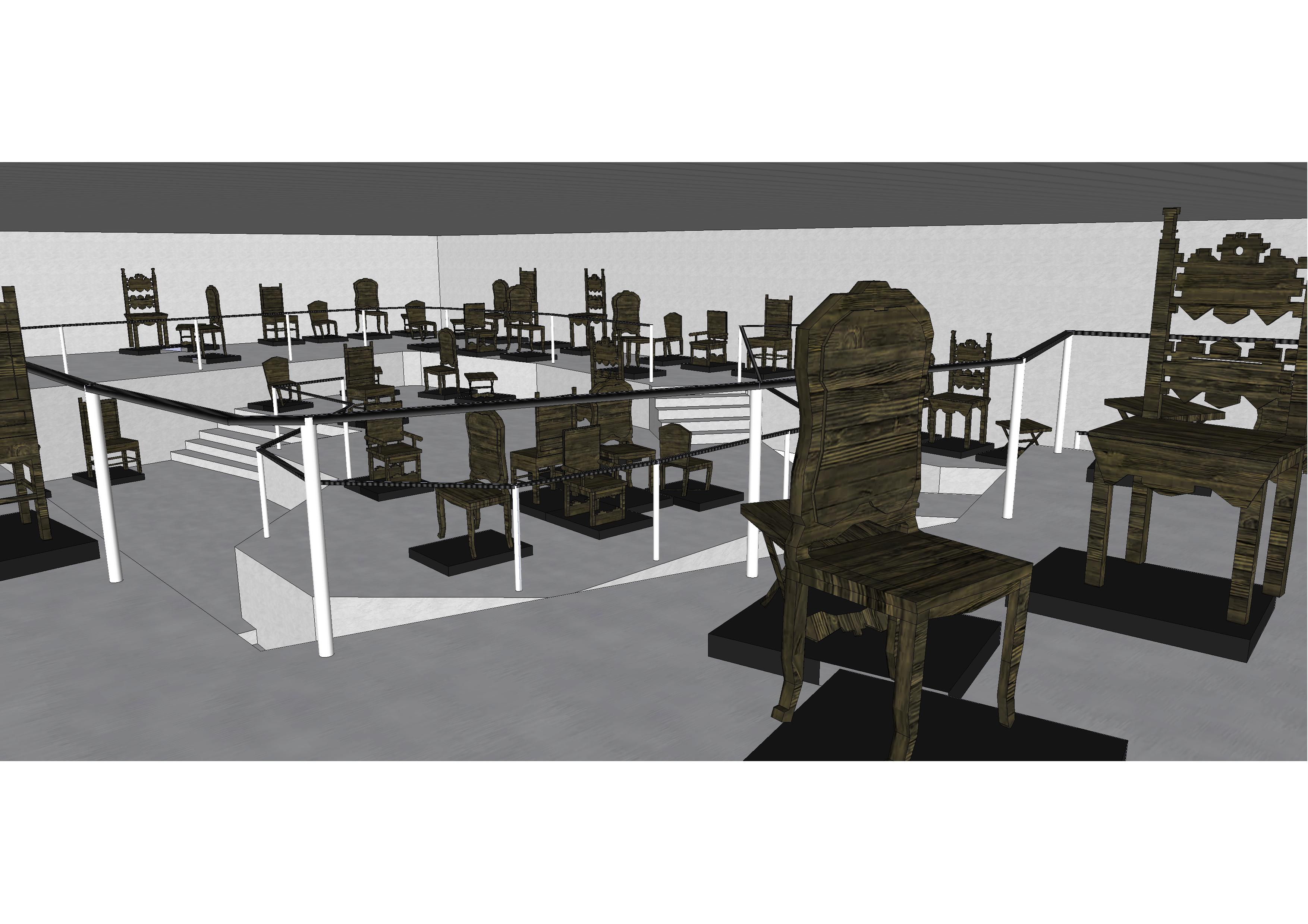 Template:Screenshotcopyrighted